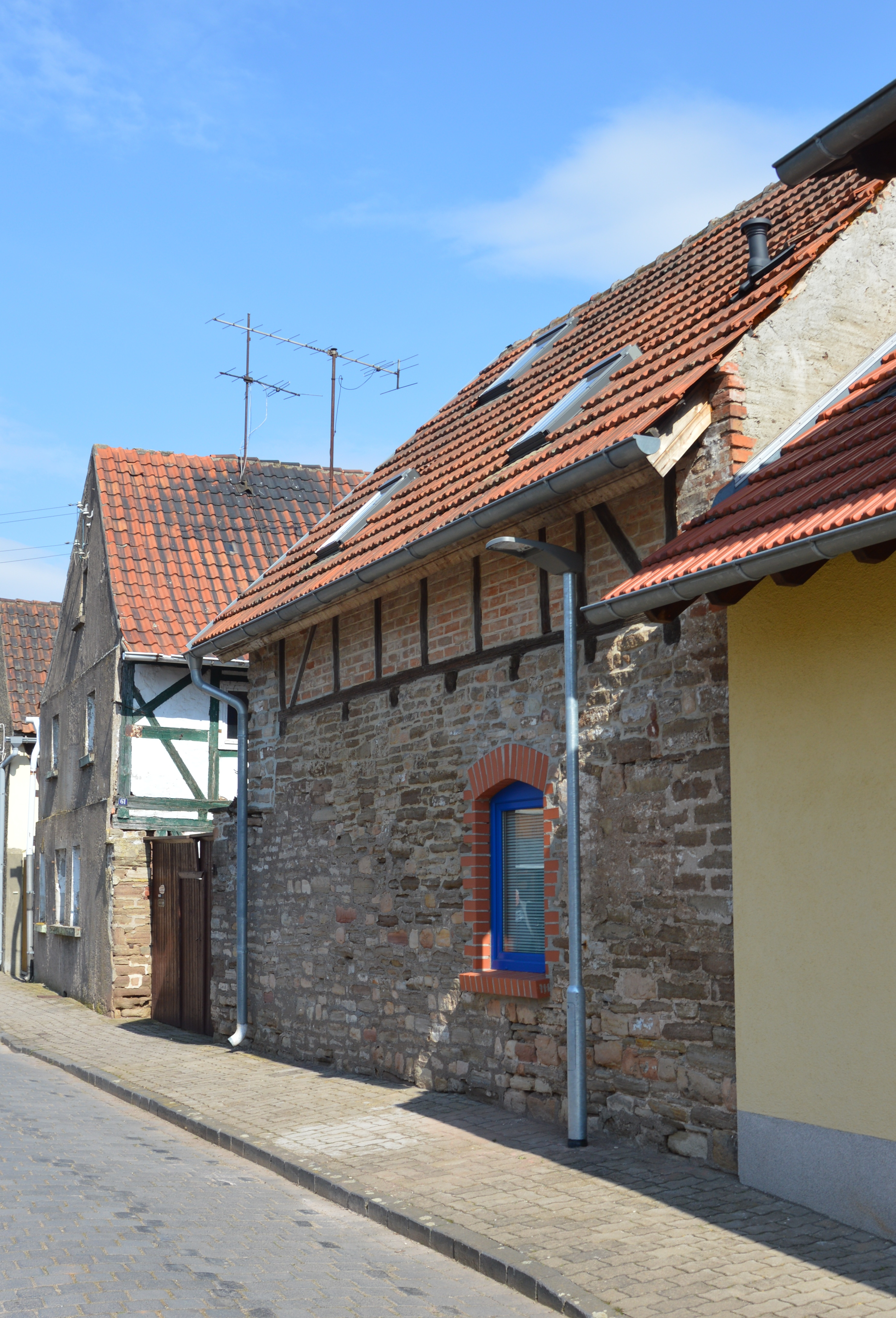 Neudorfstraße 21 in Bennungen